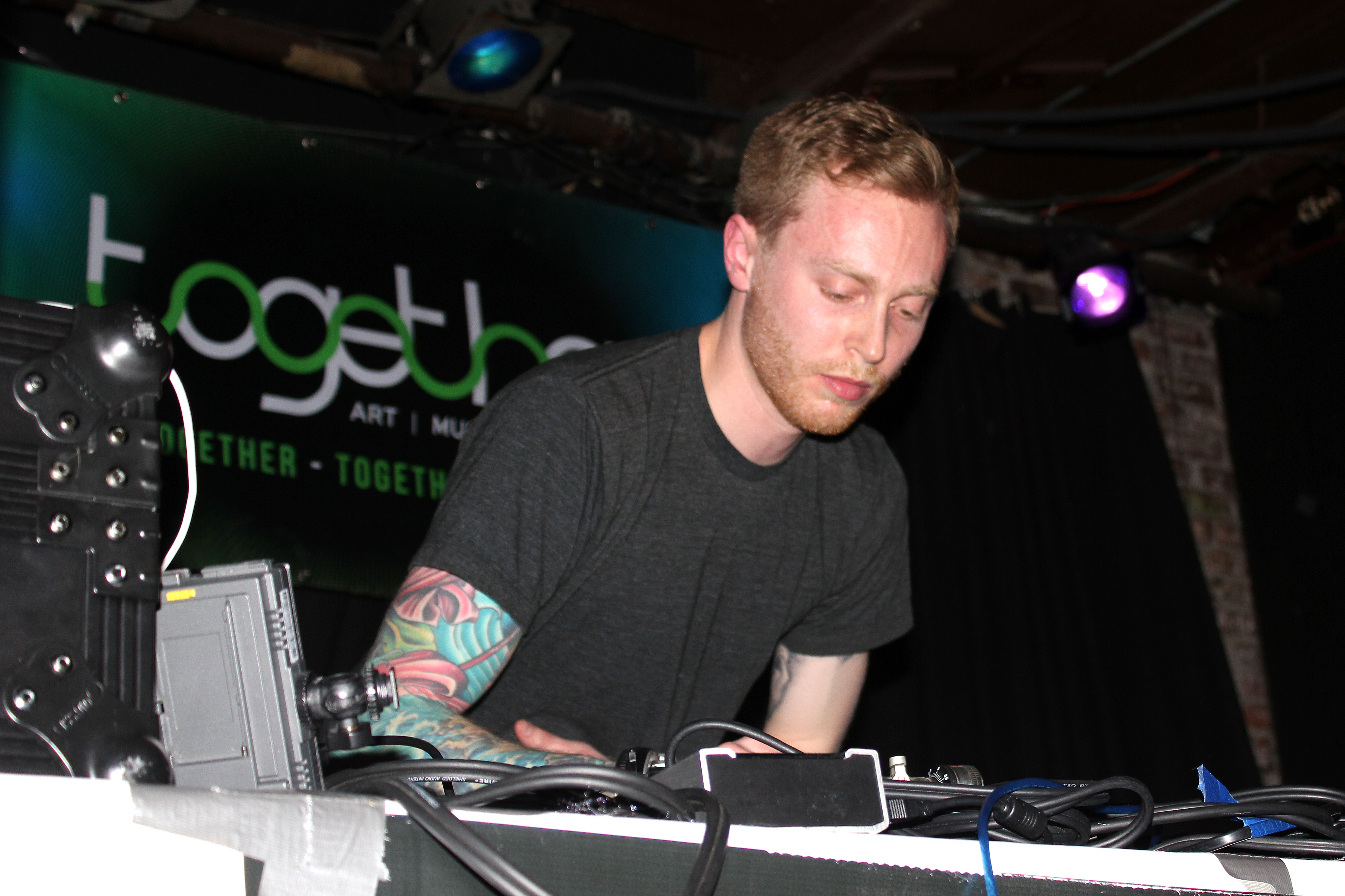 Falty DL le 5 avril 2012 au Together Festival de Boston